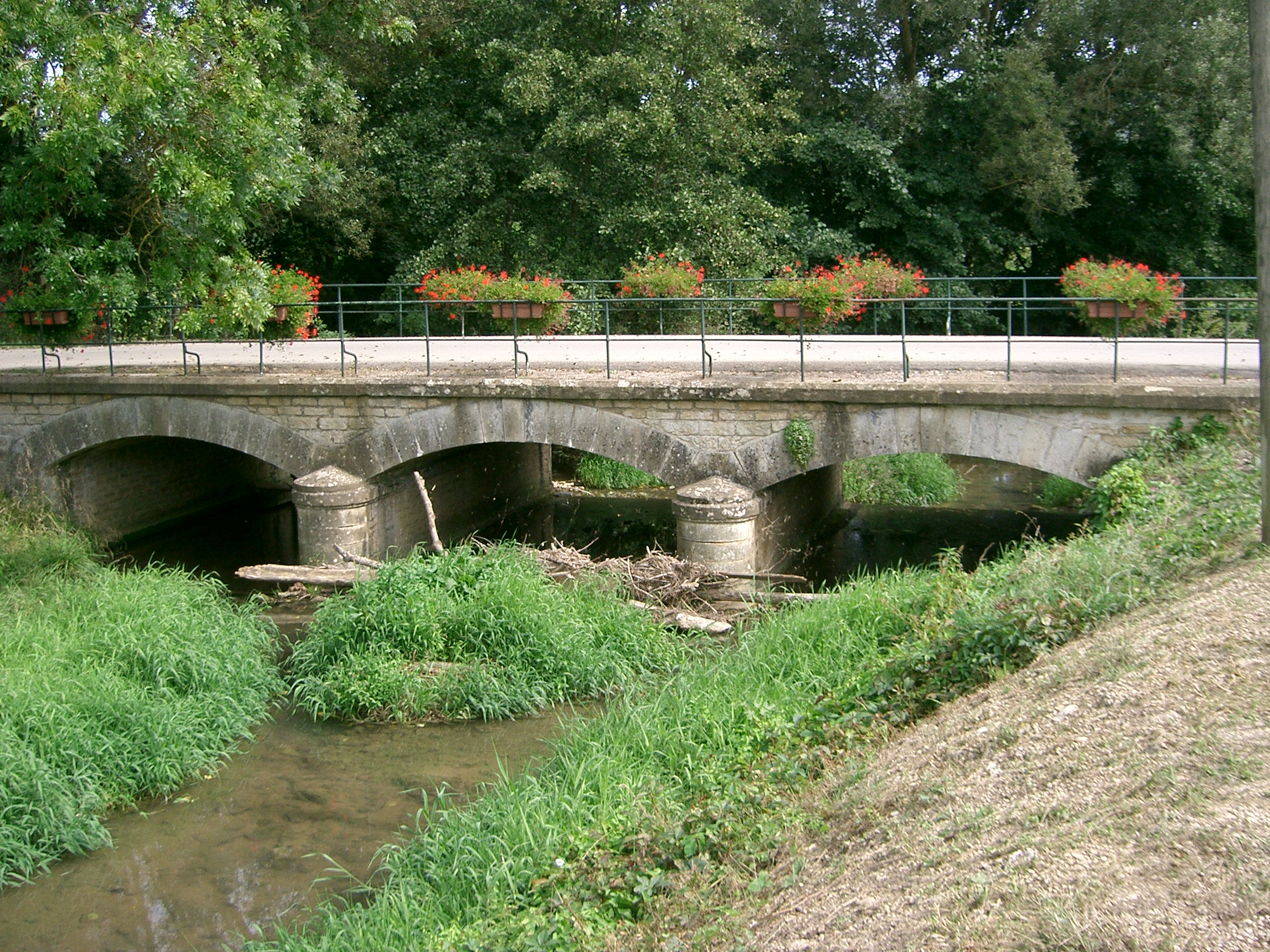 Cheilly-lès-Maranges (71) - Pont route de Santenay (vers 1850), sur la Cozanne, petit affluent de la Dheune.